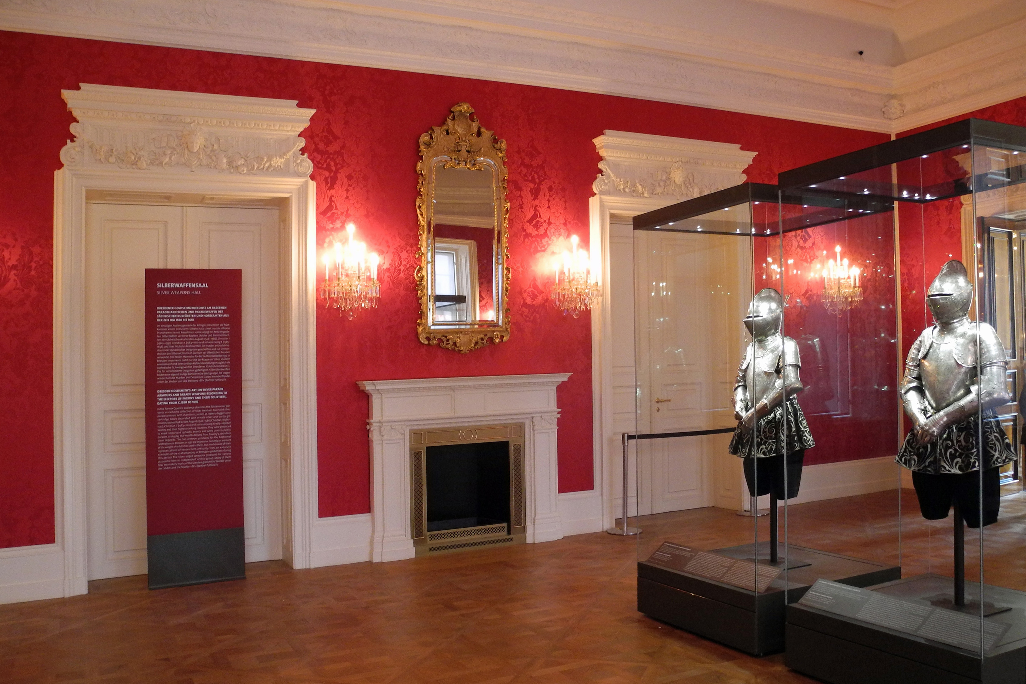 Residenzschloss Dresden – Georgenbau – Silberwaffensaal oder Rotseidenes Zimmer, urspr. Audienzgemach der Königin